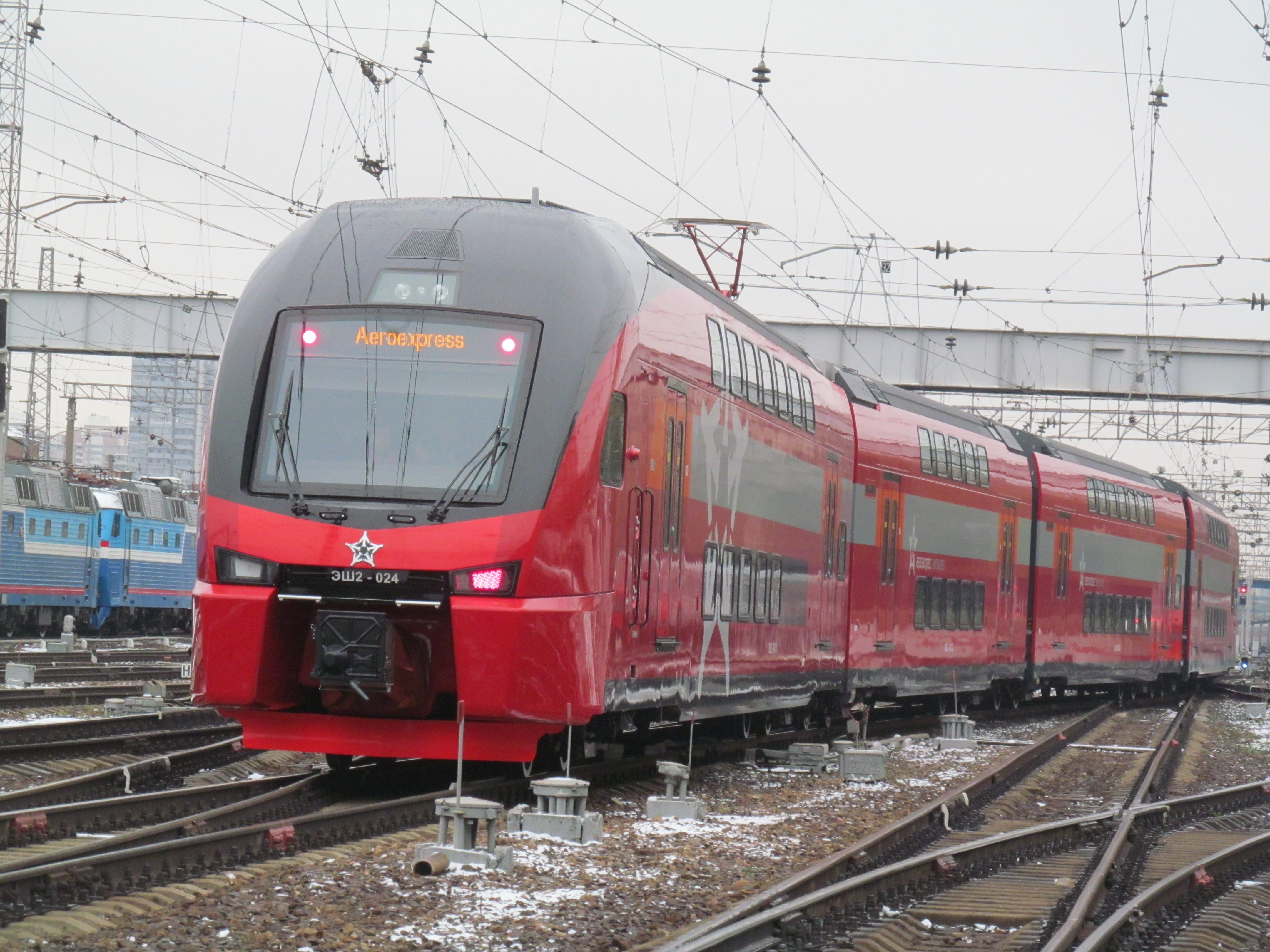 Электропоезд ЭШ2-024 на торжественном пуске двухэтажных поездов "Аэроэкспресса". Первые минуты движения (выезд из дебаркадера; вид на последний вагон)